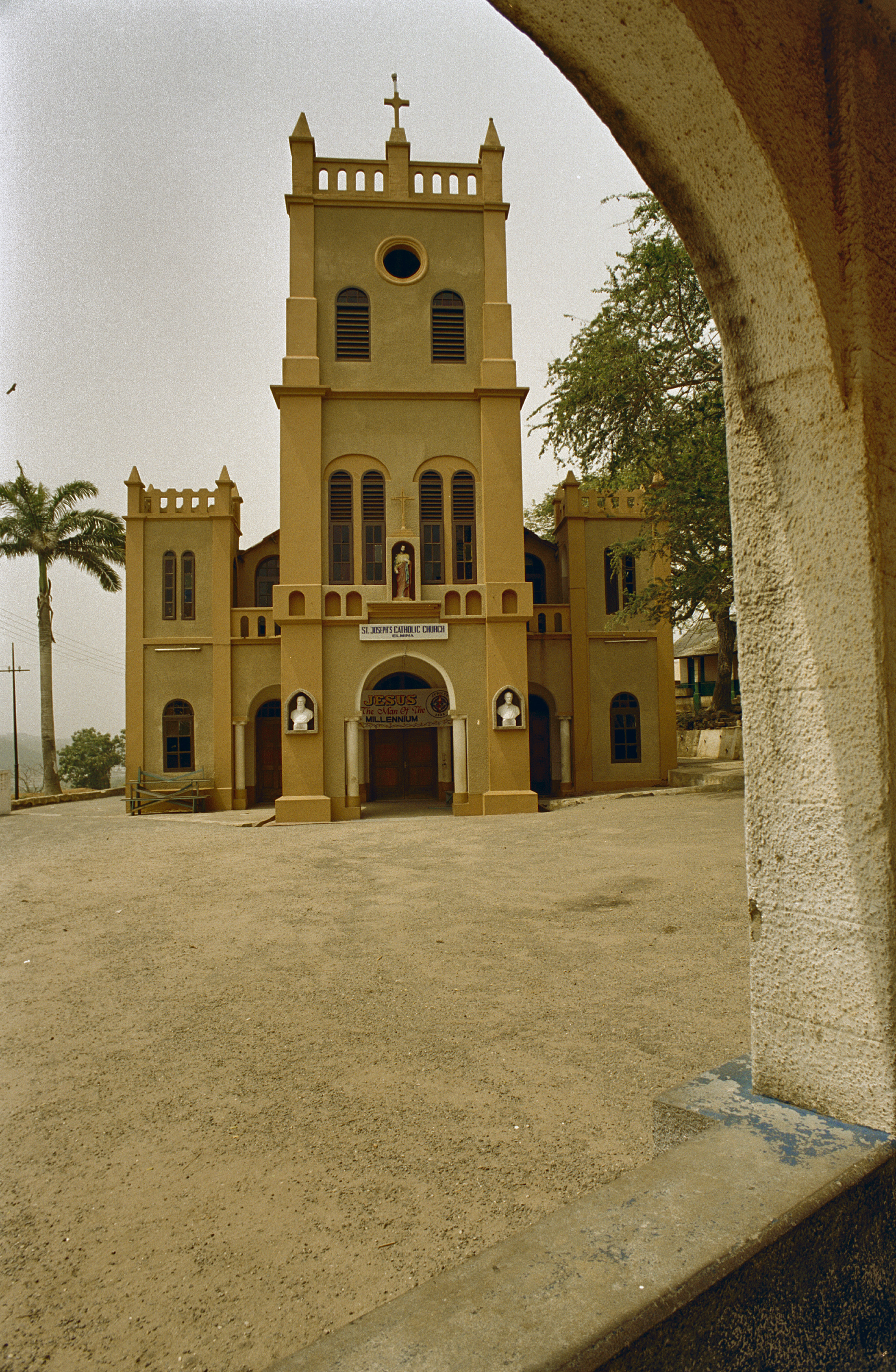 Saint Joseph Catholic Church: Overzicht westgevel met toren (opmerking: Ghana reis Loek Tangel)